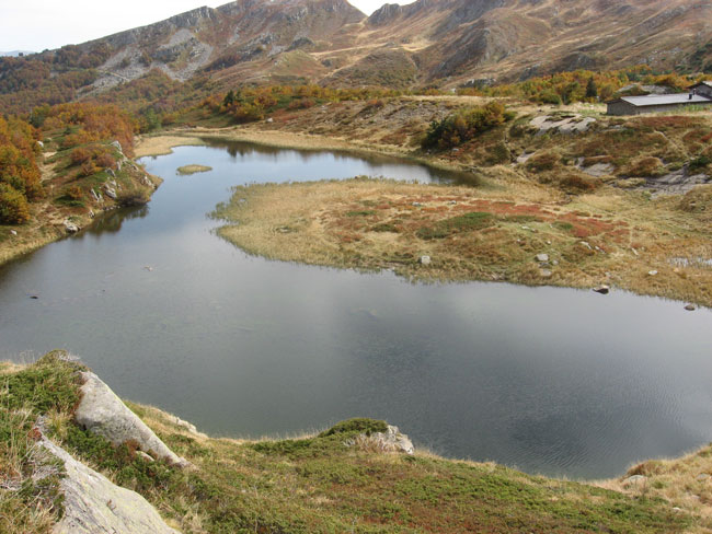 Concedo licenza libera. Sono io l'autore della foto, scattata appositamente per Wikipedia, in uno scorcio autunnale.